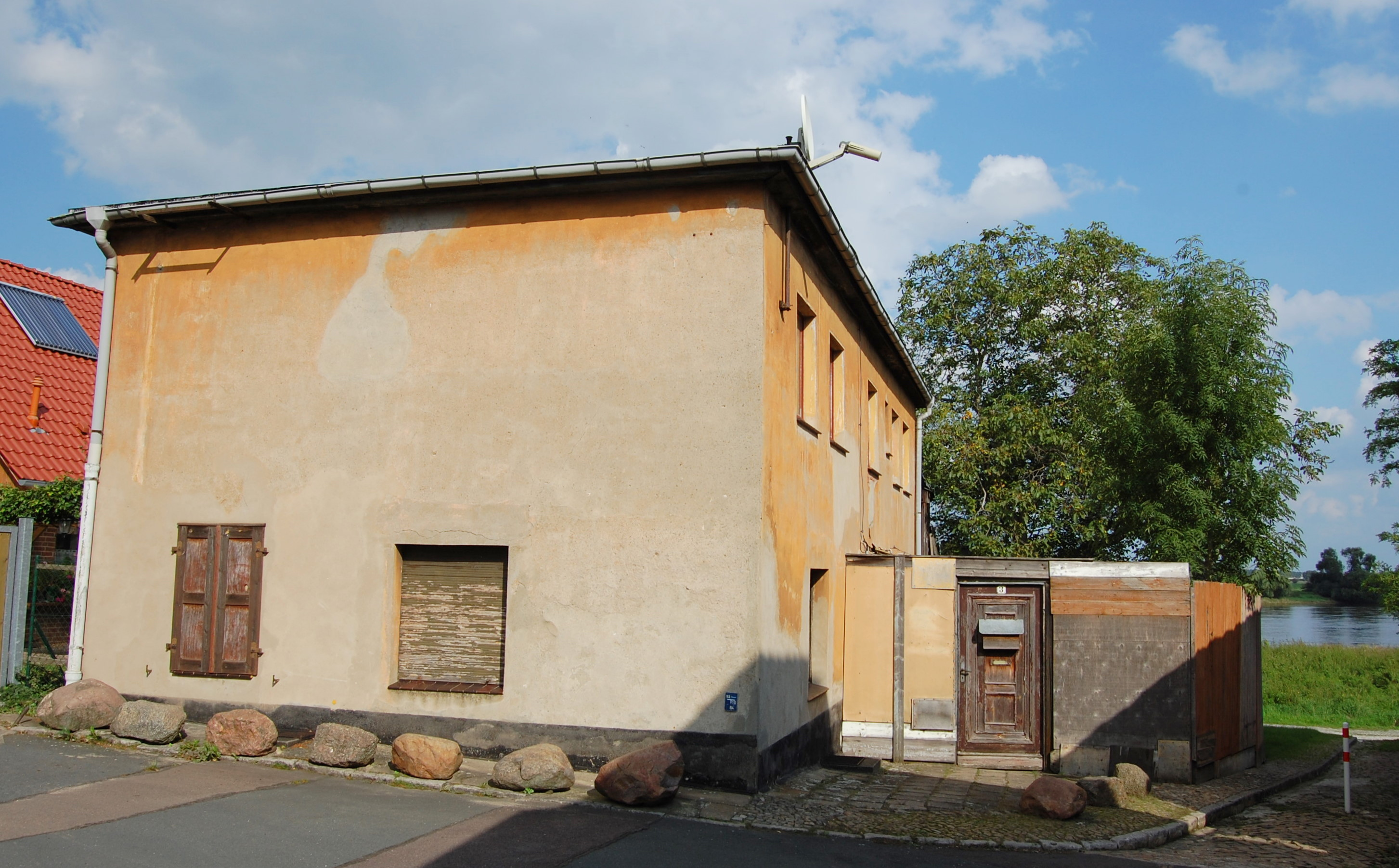 Elmer Straße 3 in Magdeburg-Westerhüsen, ehemalige Schule